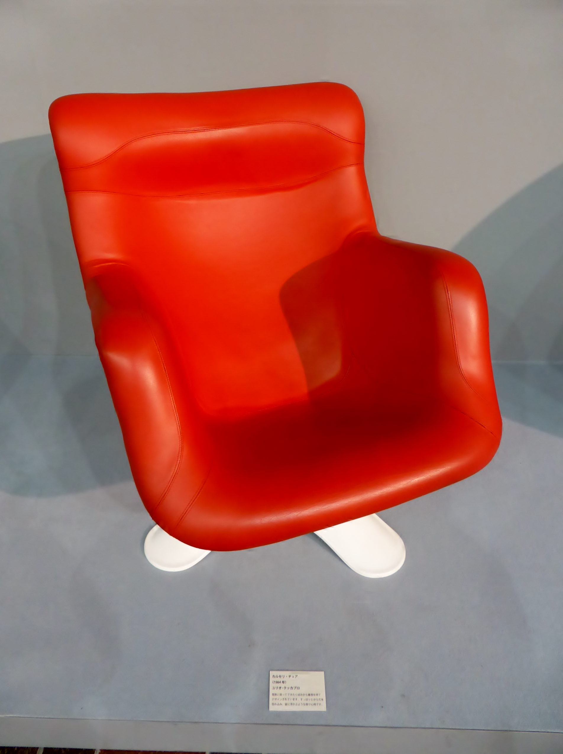 カルセリ・チェアを撮影。